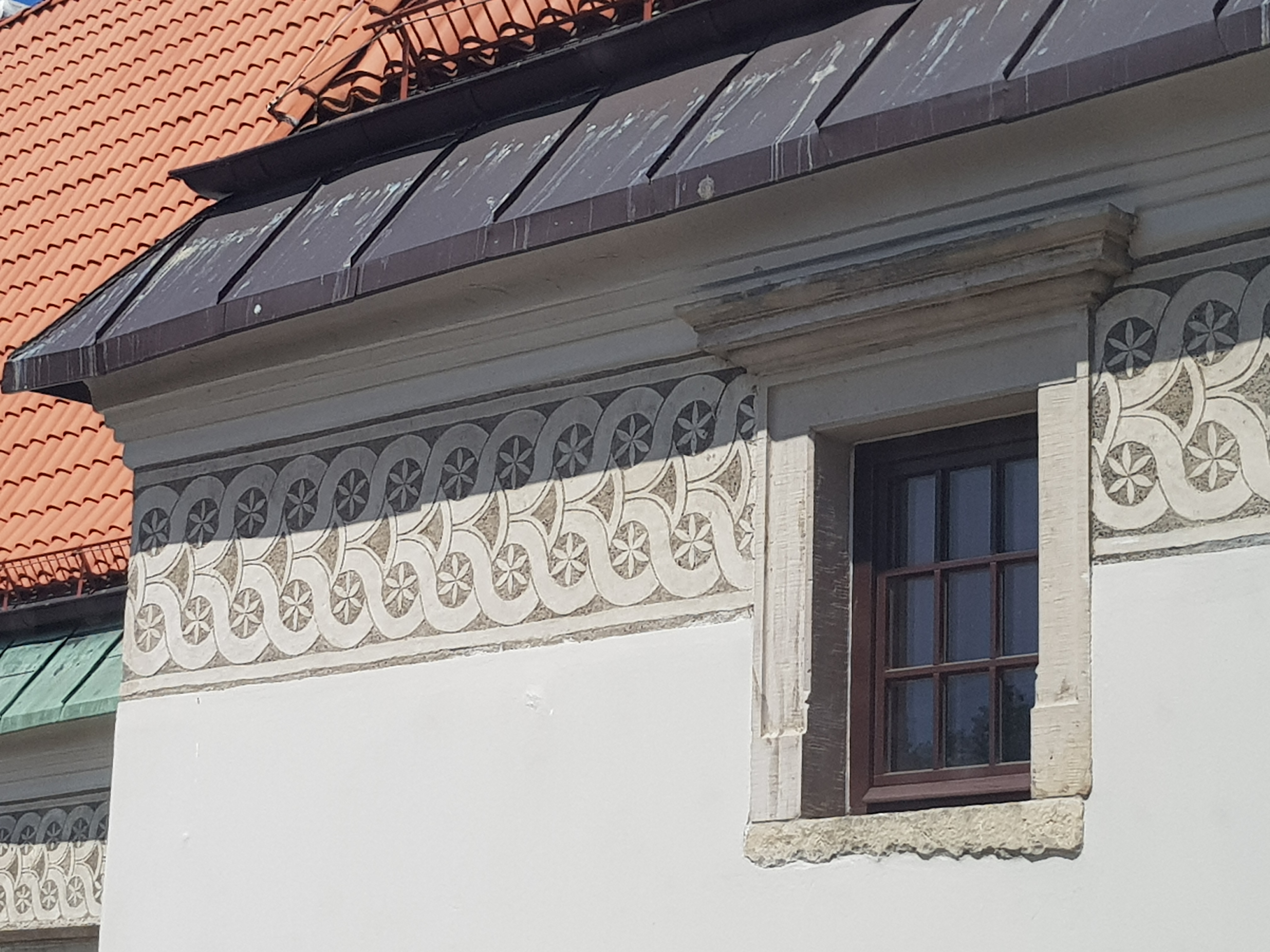 Dekoracja na dziedzińcu